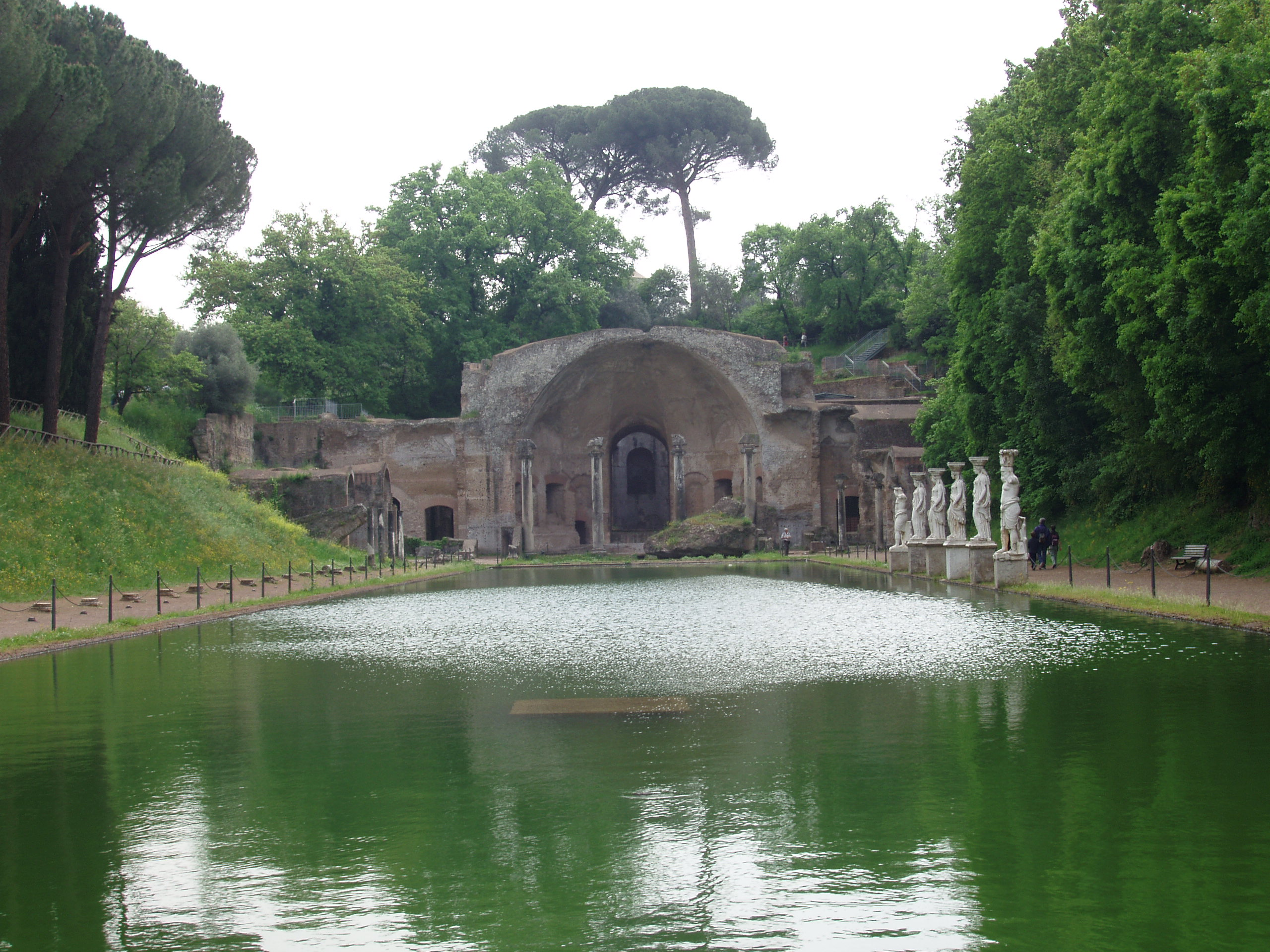 Descrption Canopus at Villa Adriana in Tivoli.